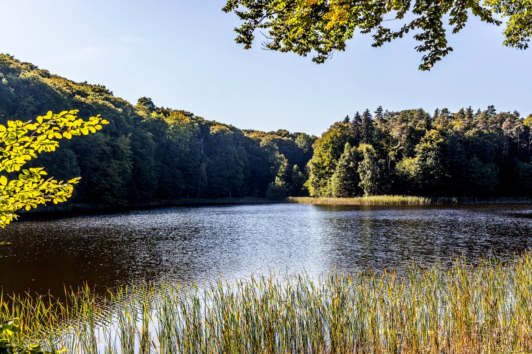 Buckowsee im Grumsiner Buchenwald ca.6,3ha